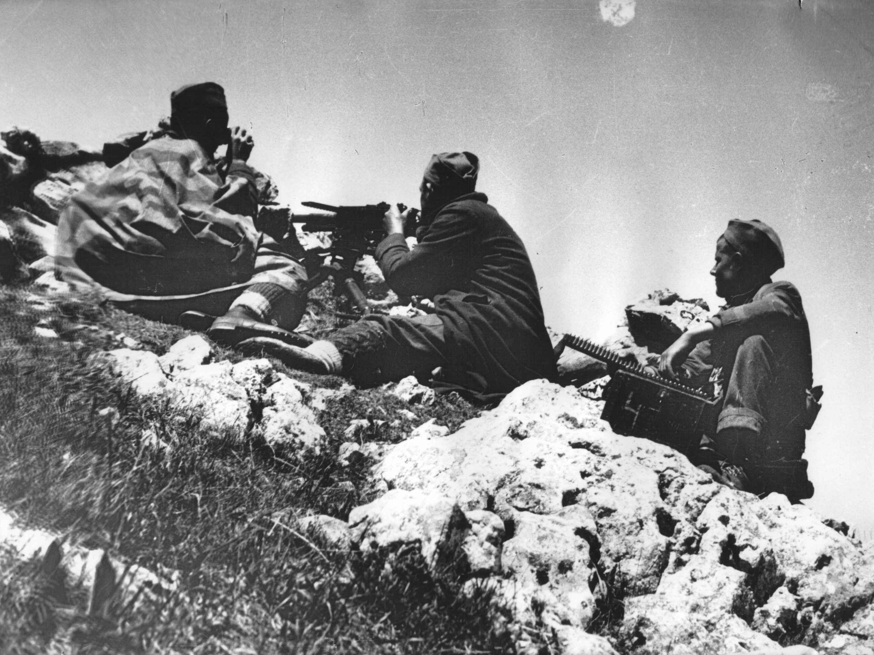 Mitraglieri della Quinta brigata proletaria montenegrina